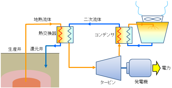 地熱バイナリー発電設備の概略図（参考：地熱学会、地熱エネルギー入門（翻訳）地熱資源の利用）